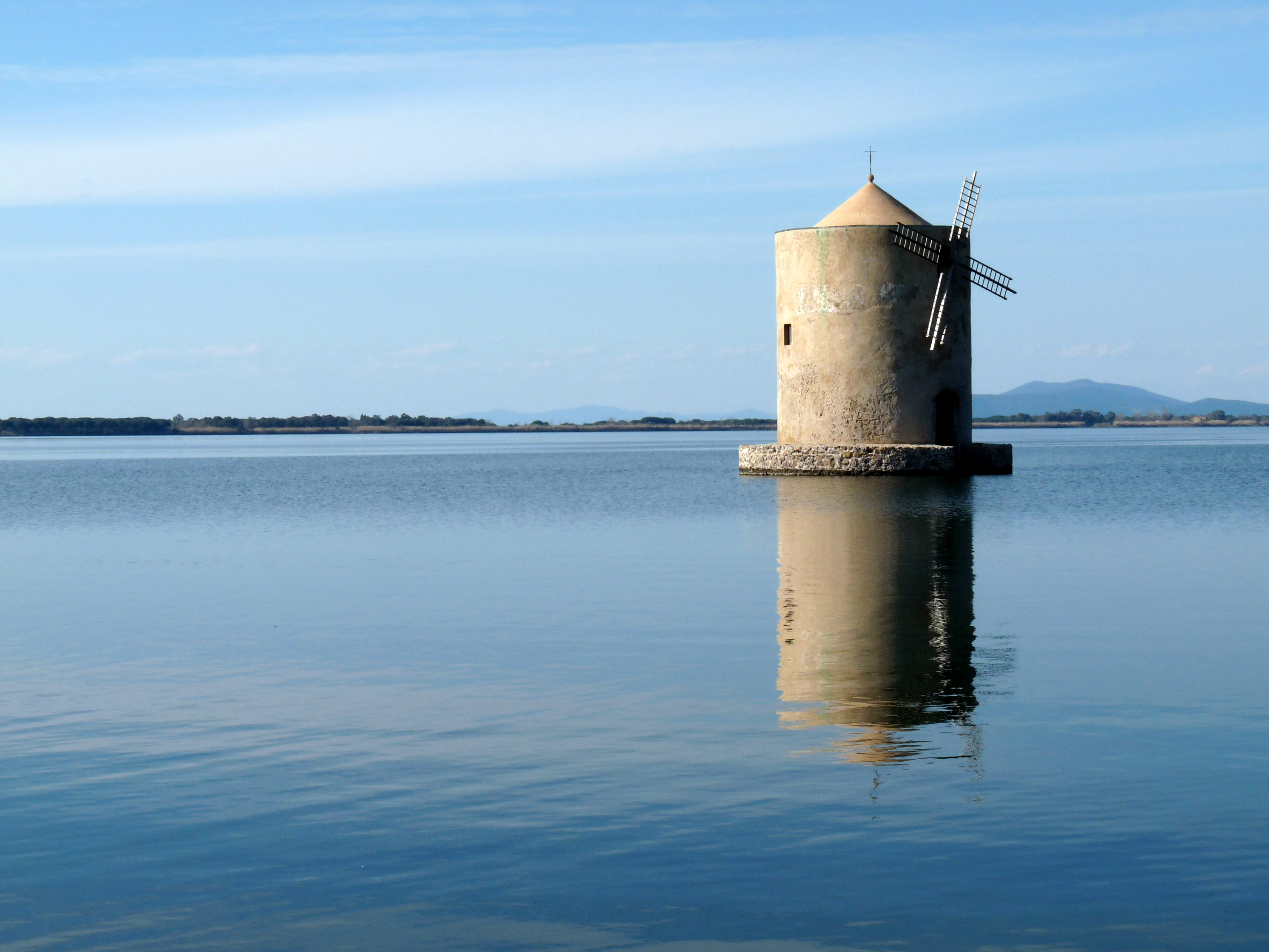 Argentario / Toscana